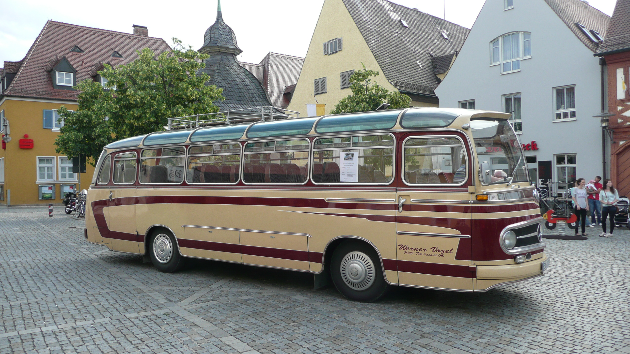 Oldtimer Bus Mercedes-Benz O 321 Drögmöller der Firma Vogel in Höchstadt